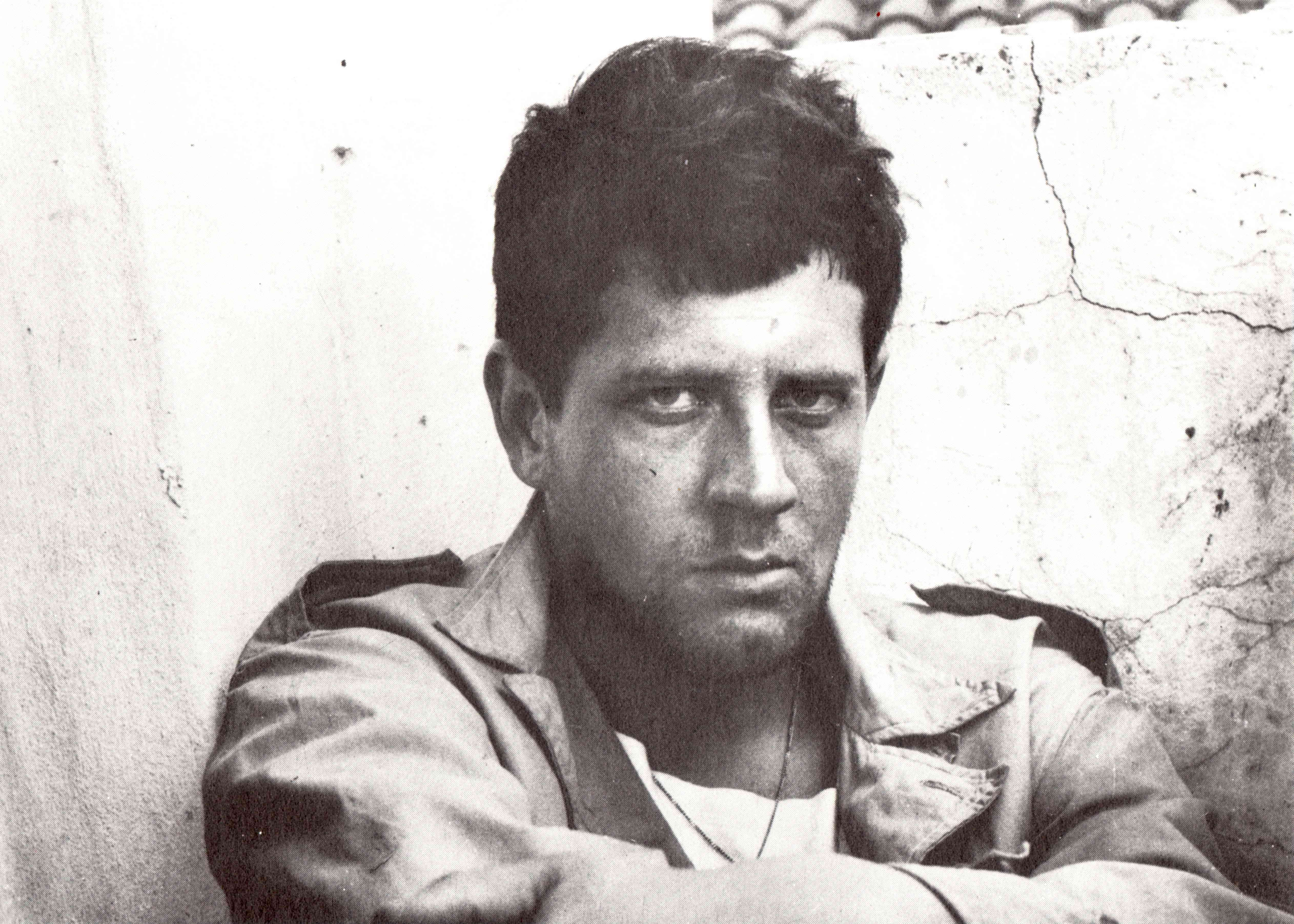 Hugo Pratt a San Isidro, nei pressi di Buenos Aires, Argentina. (foto della paggina 15 del libro)